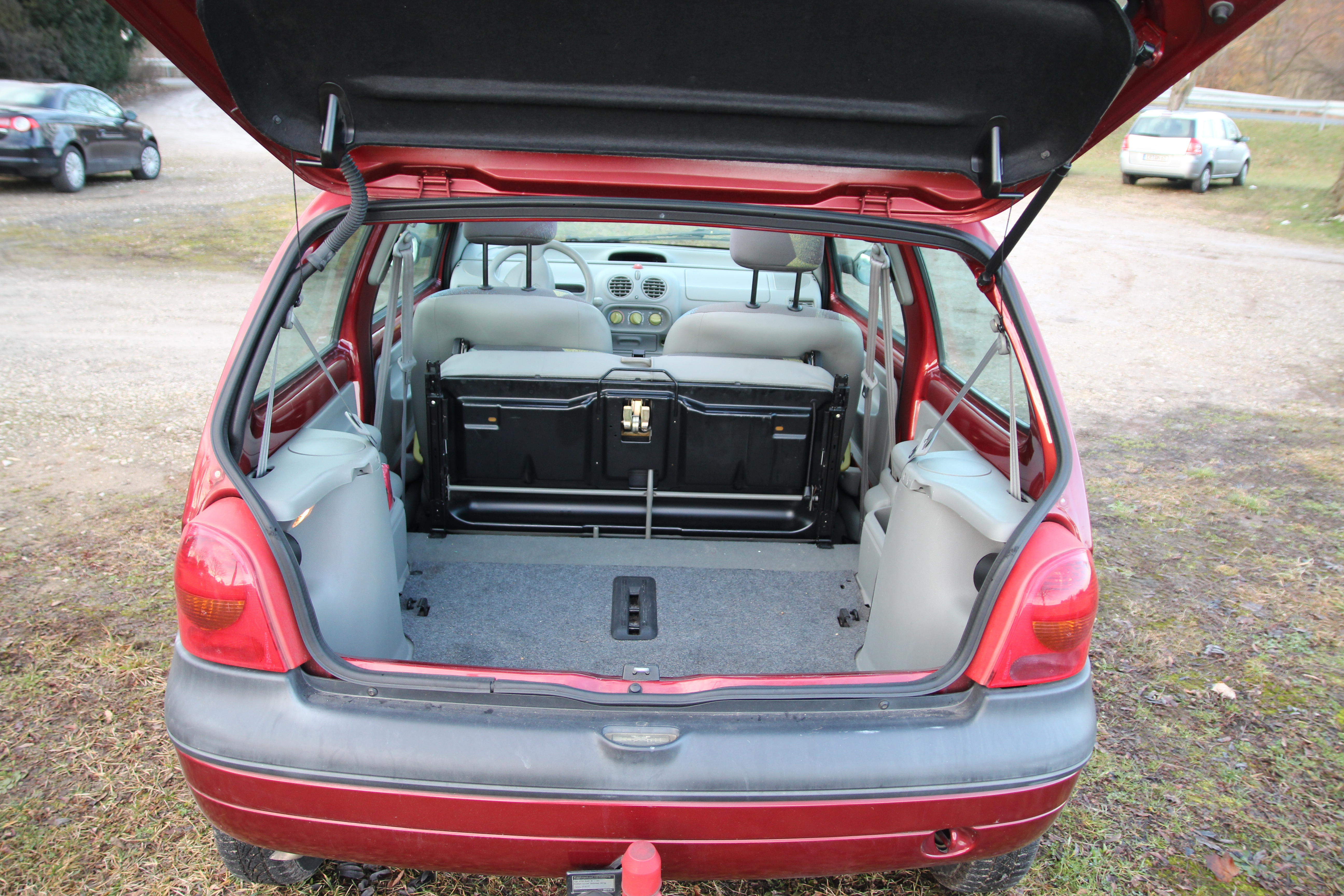 Die Rückbank vorgeklappt ergibt ein Kofferraumvolumen für 20 Bierkästen.